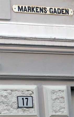 Markens gaden - en tredje skrivemåte som er i bruk på gateskilt (2009)